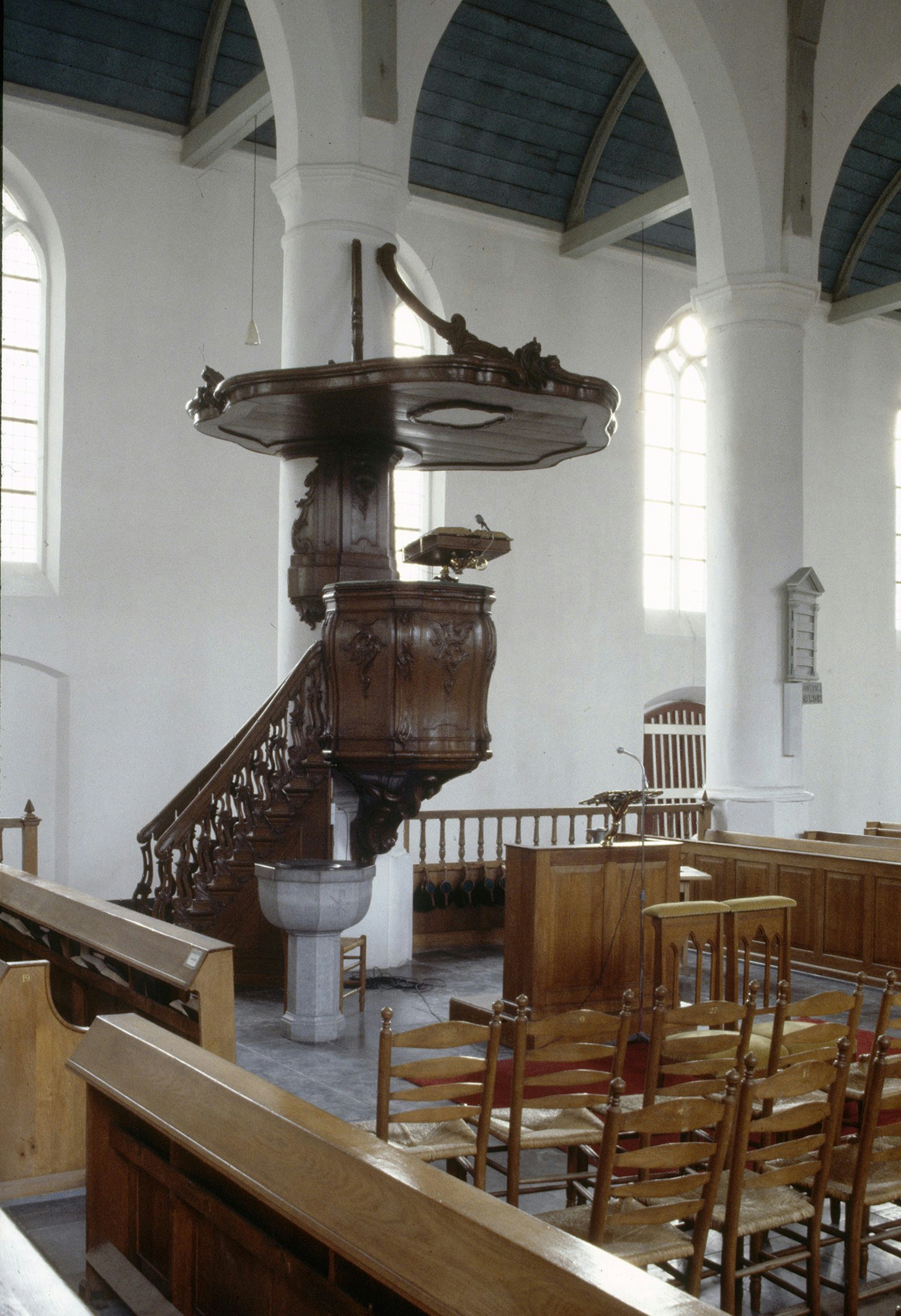 NEDERLANDS HERVORMDE KERK (OUDE KERK): Interieur OVERZICHT NAAR ZUIDER ZIJBEUK MET PREEKSTOEL